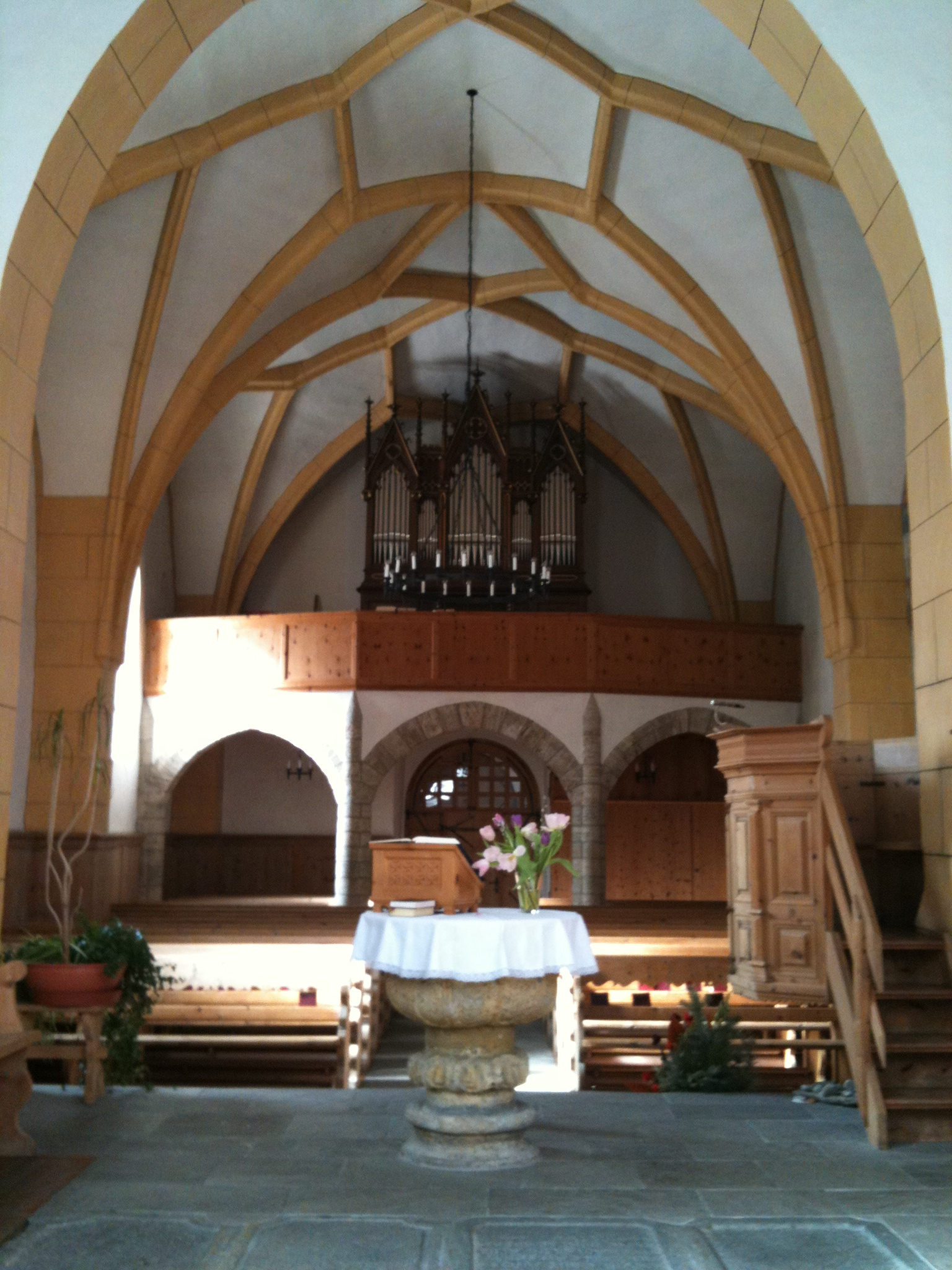 reformierte Kirche Silvaplana, Innenansicht vom Chor aus